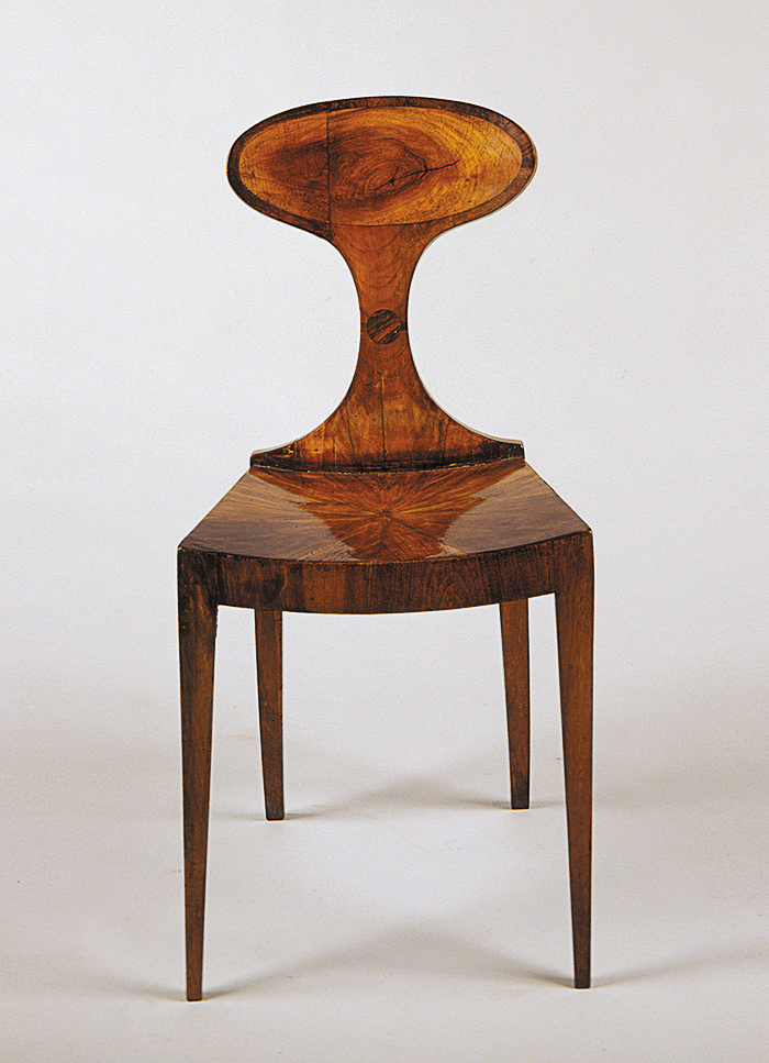 Biedermeierská židle, po r. 1820, Uměleckoprůmyslové muzeum v Praze